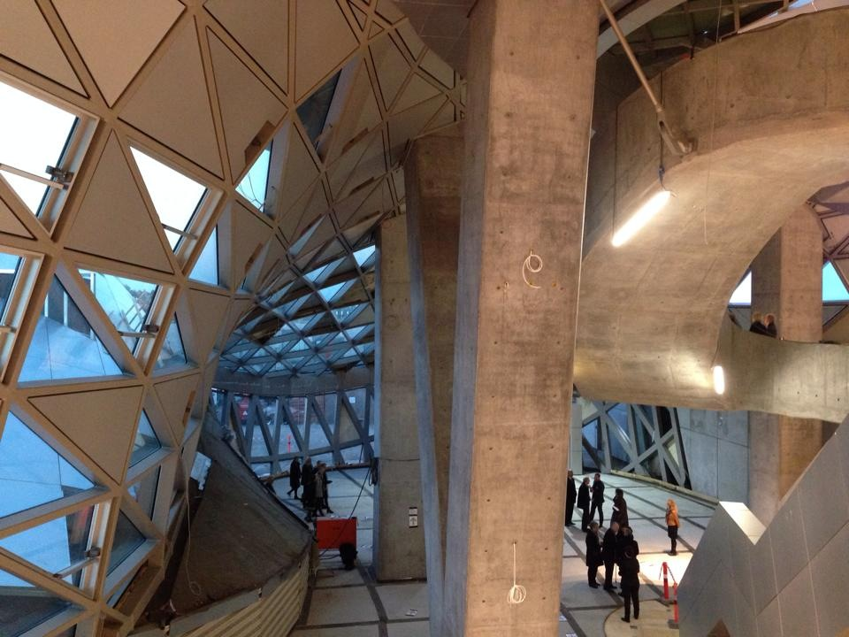 Foyeren i Musikkens Hus i Aalborg